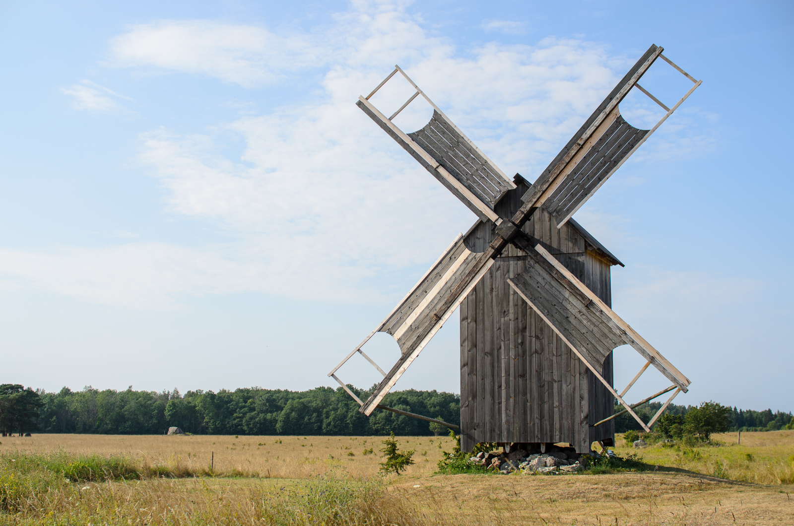 Kukka tuulik